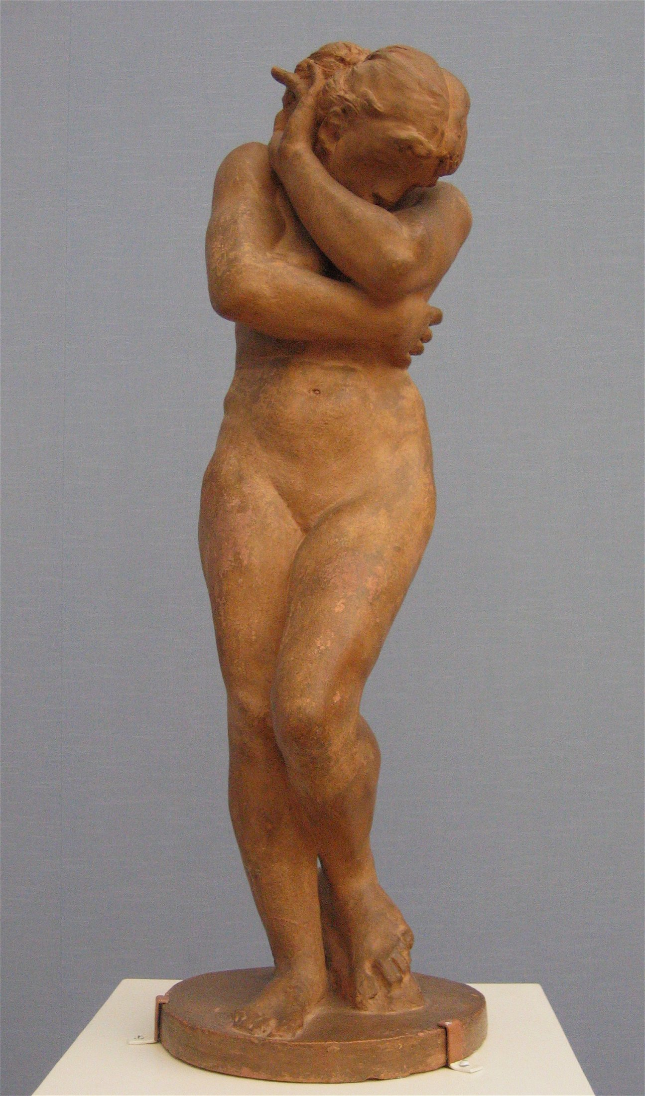 Auguste Rodin: Eva, 1881